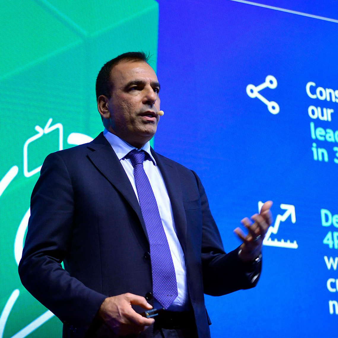 Amos Genish